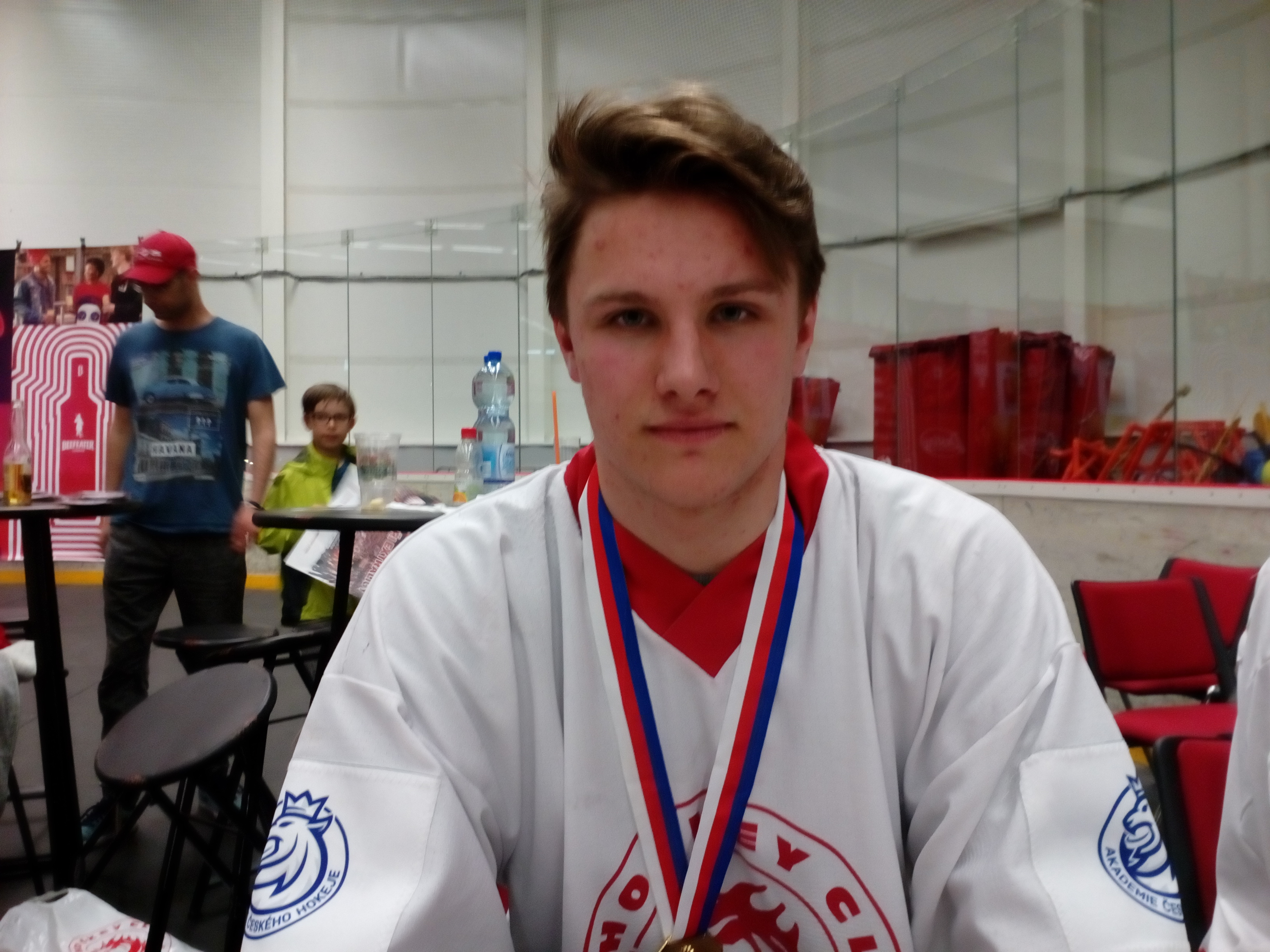 Po zakončení sezóny 2018/19 na autogramiádě v malé (tréningové) Werk Areně